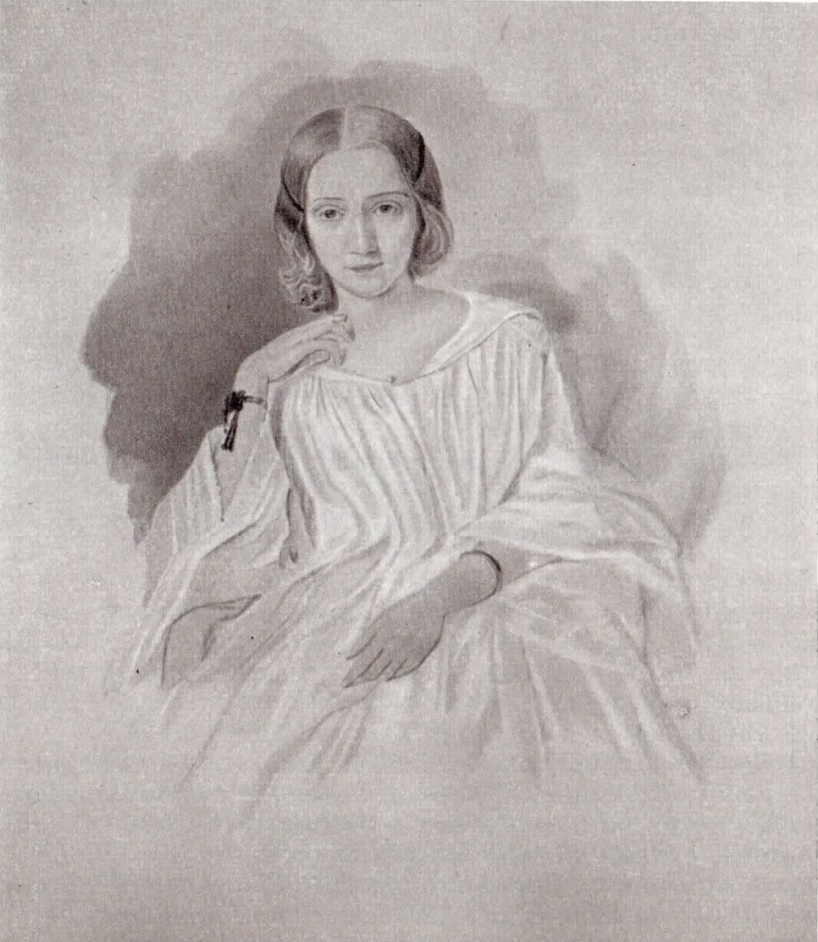 Елизавета Богдановна Грановская - супруга Т.Н. Грановского (1813-1855).